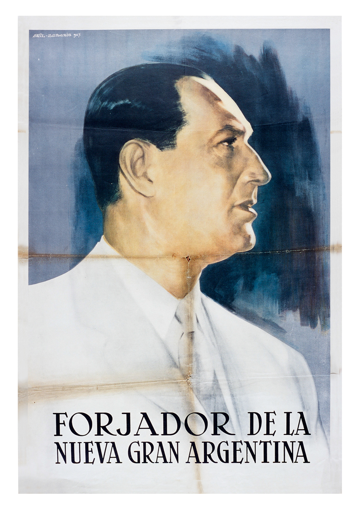 Forjador de la Nueva Argentina. Afiche con el retrato del ex presidente argentino Juan Domingo Perón.